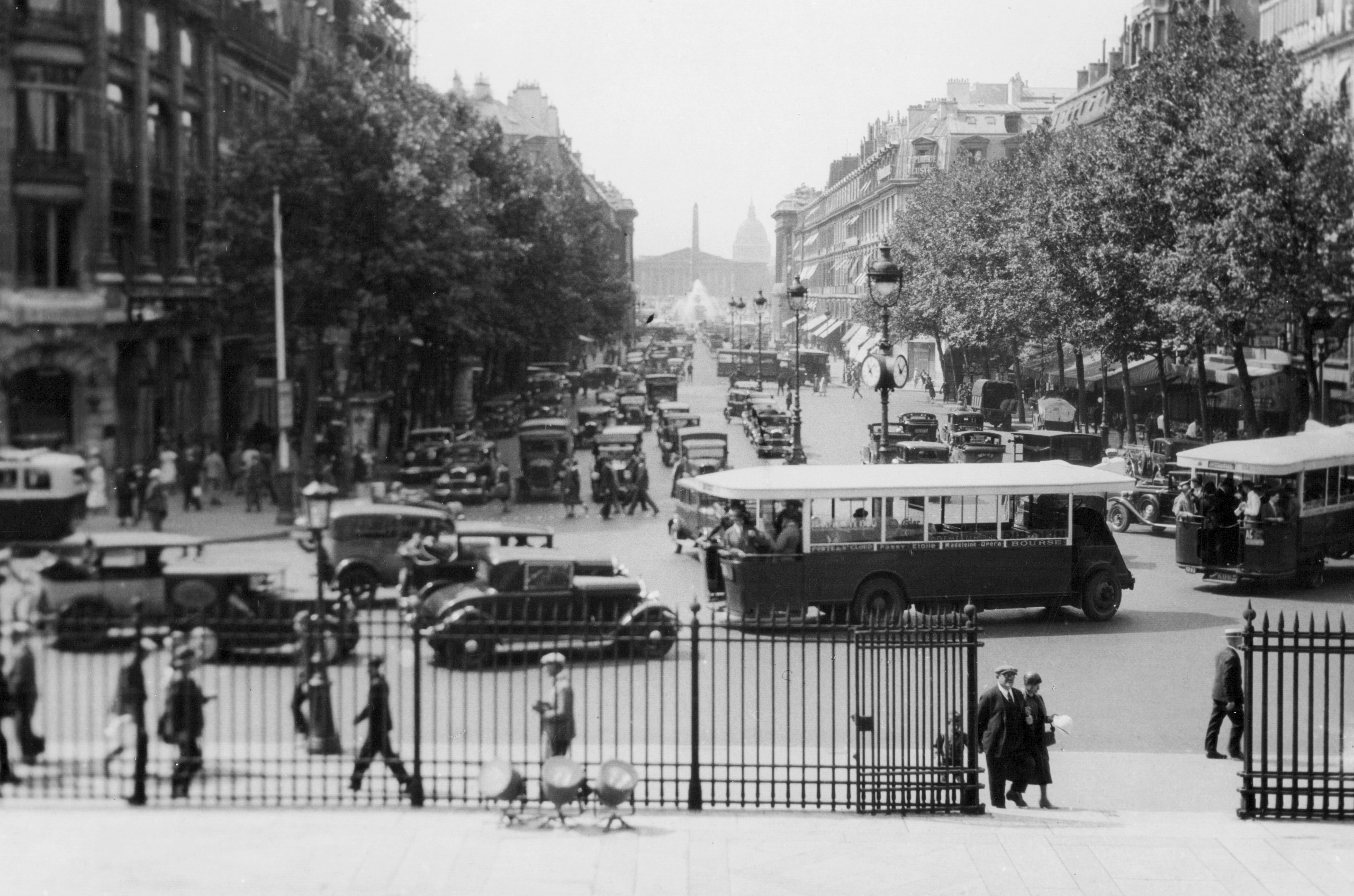 a Rue Royale a Madeleine-templom felől, háttérben az Obeliszk, a Nemzetgyűlés épülete és az Invalidusok templomának kupolája Location: France, Paris Tags: automobile, traffic, bus Title: a Rue Royale a Madeleine-templom felől, háttérben az Obeliszk, a Nemzetgyűlés épülete és az Invalidusok templomának kupolája